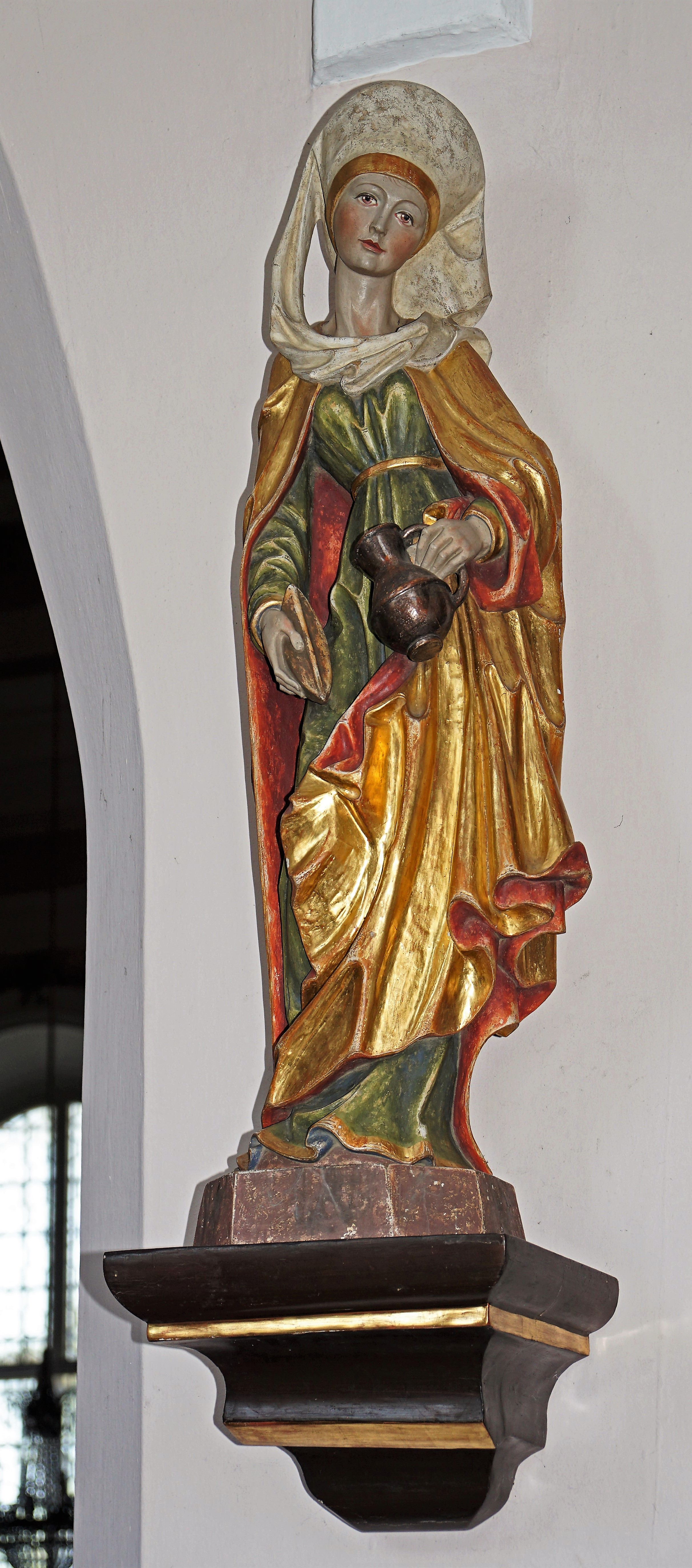 Kath. Pfarrkirche Mariae Verkündigung, Grödig, Statue der hl. Verena